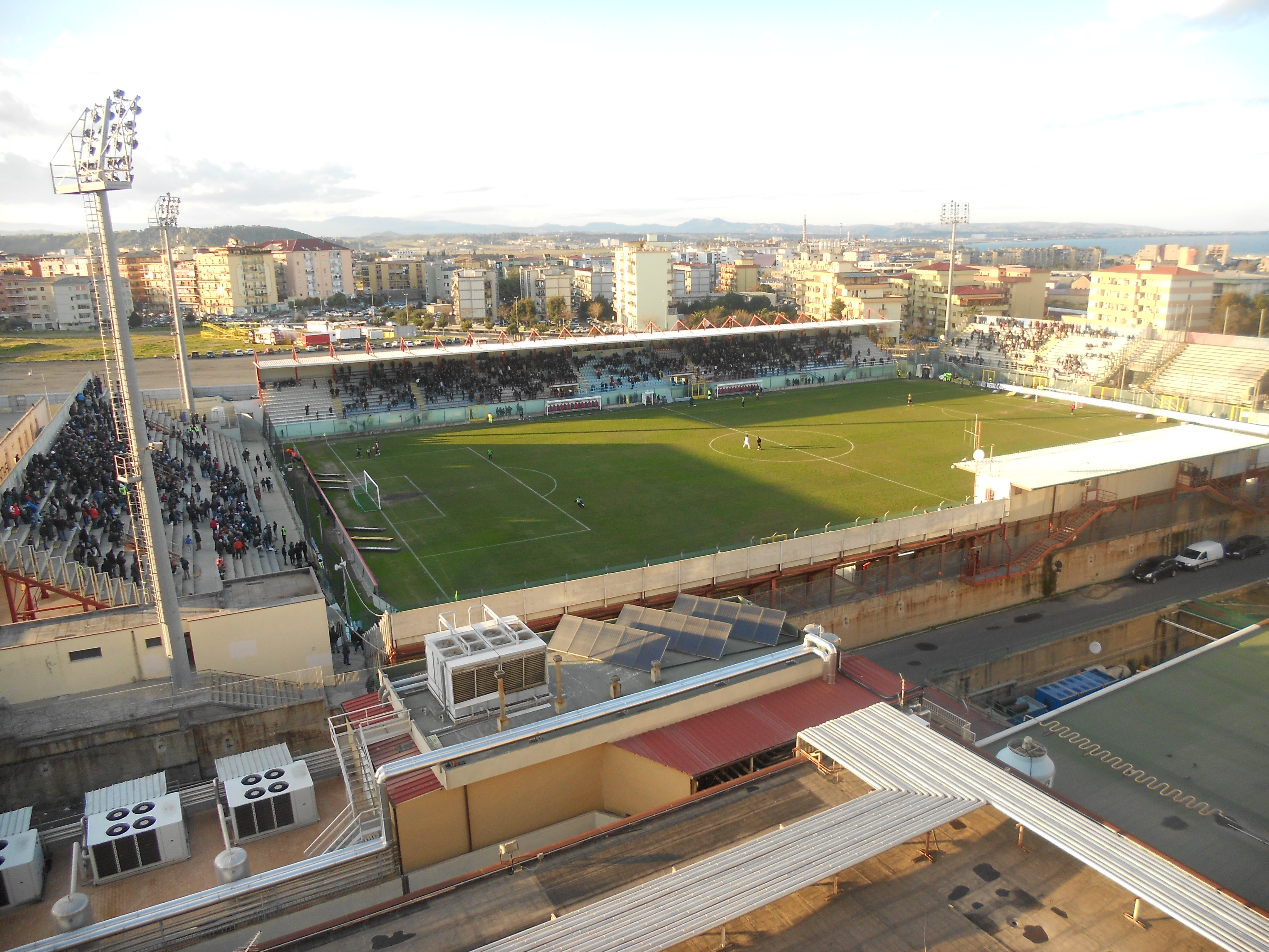 Lo stadio comunale "Ezio Scida" di Crotone